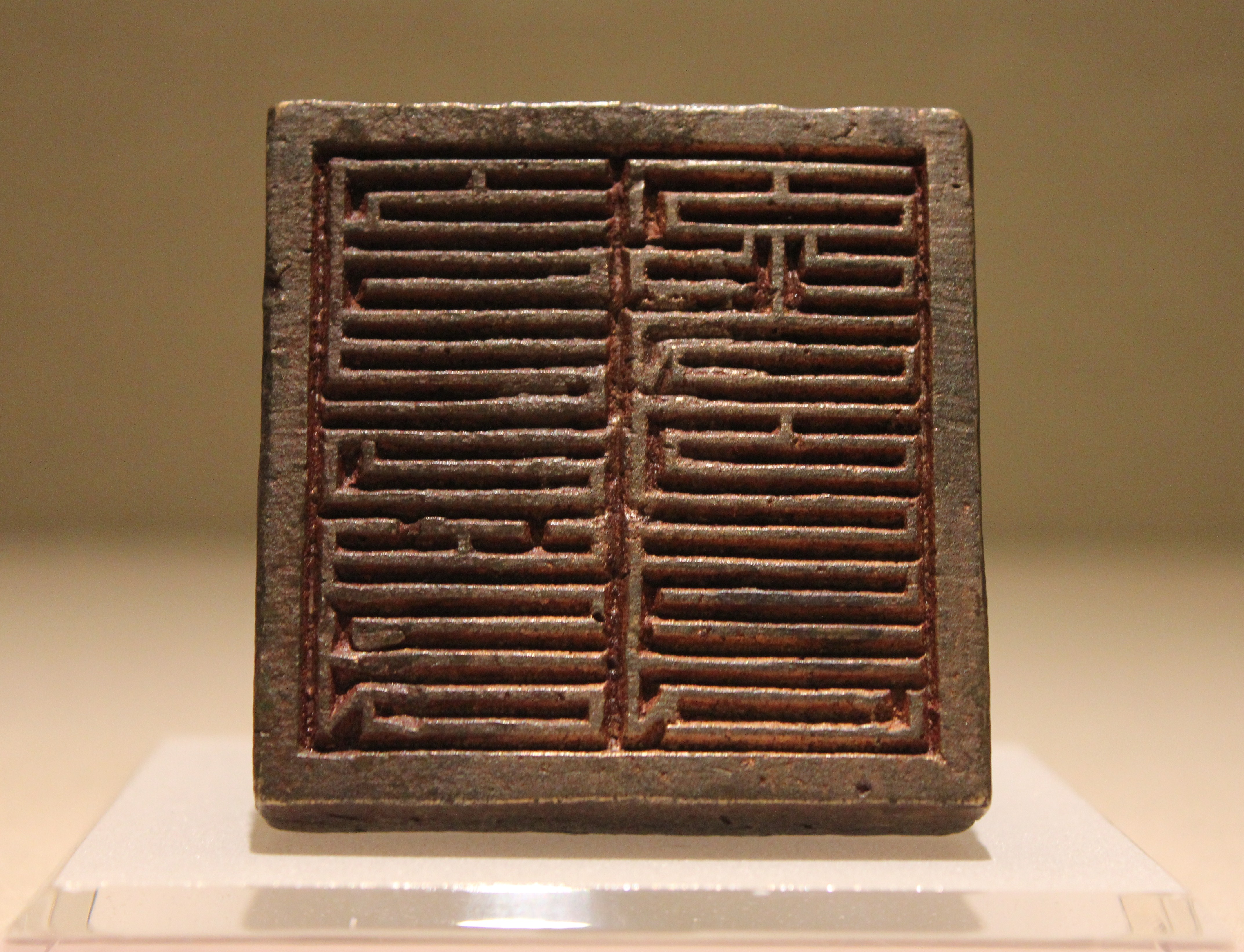 管軍総把印